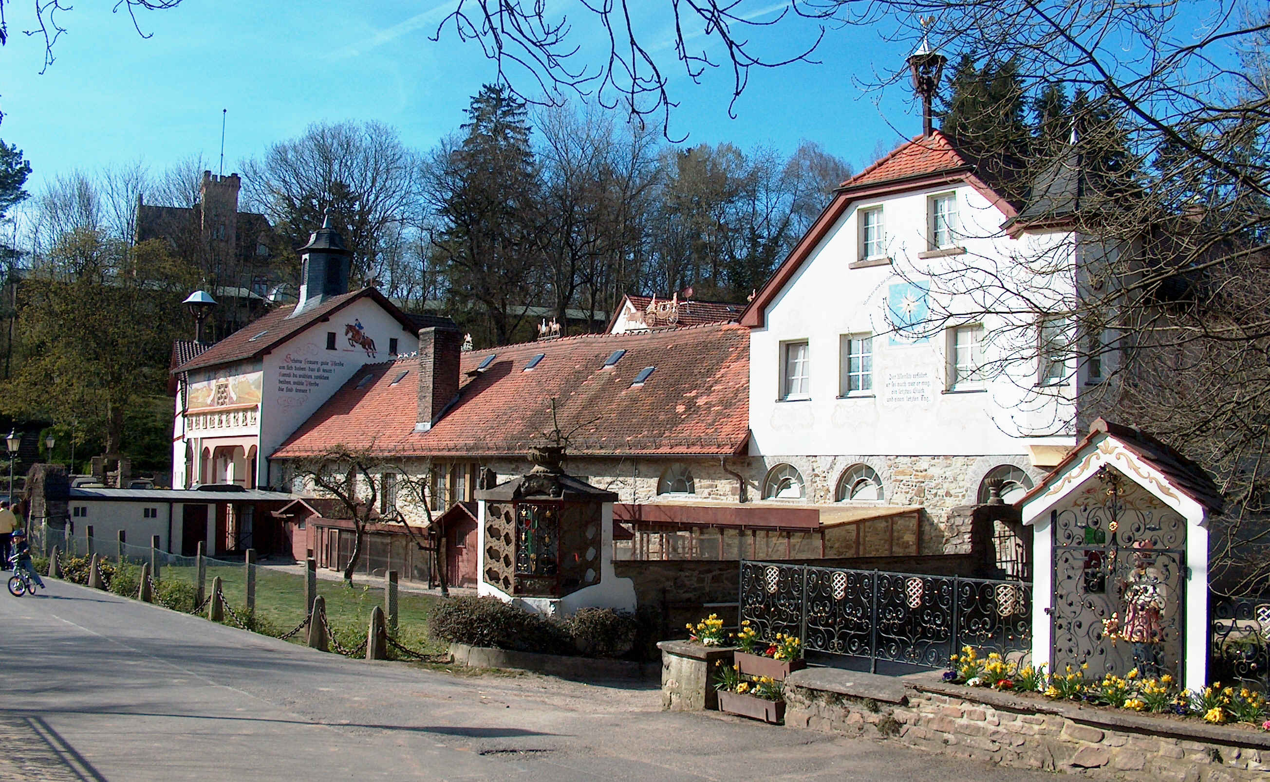 en.: Rettershof at Kelkheim near Frankfurt, Germany; dt.: Rettershof in Kelkheim bei Frankfurt/Main